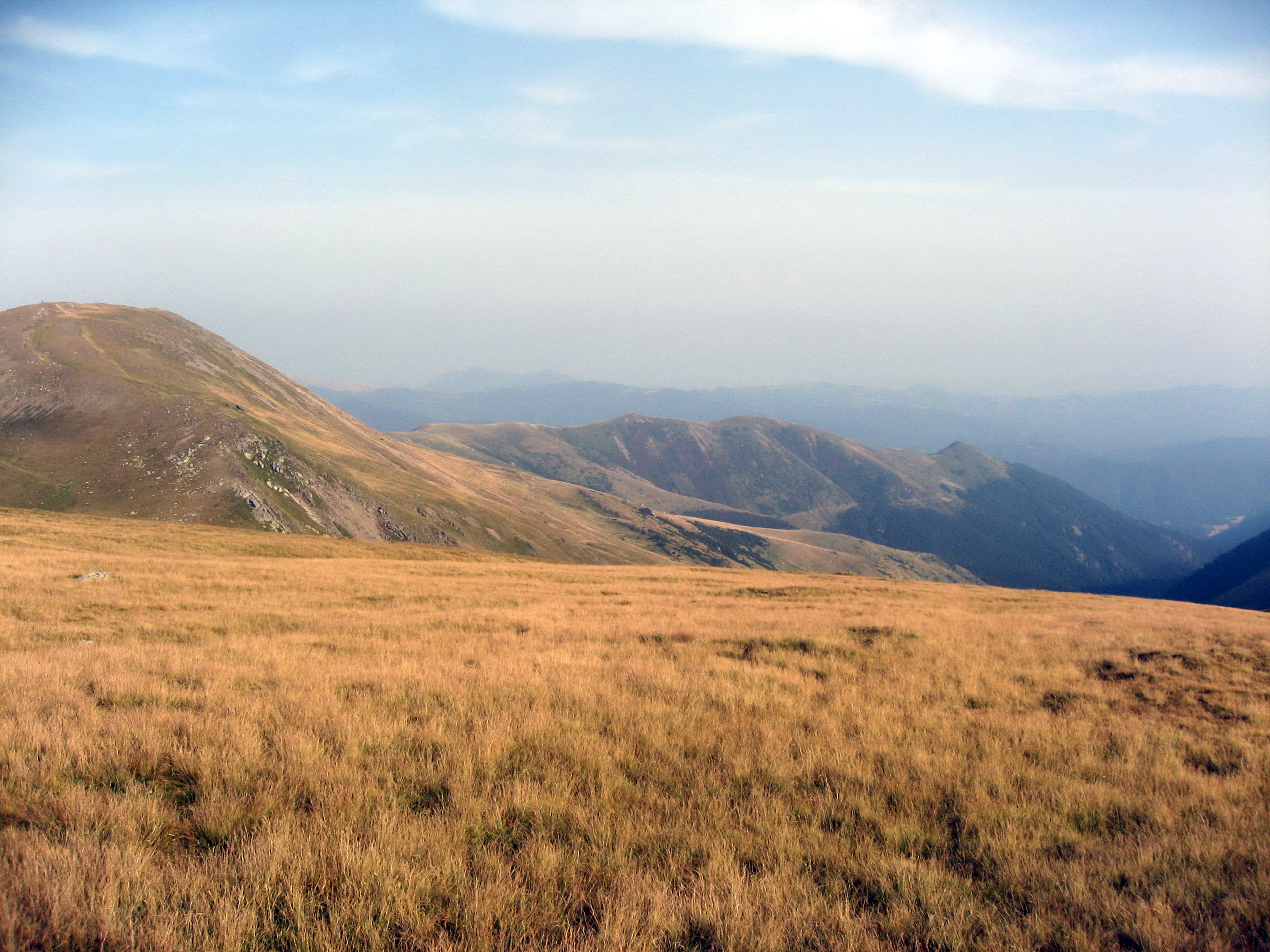 pohoří Godeanu